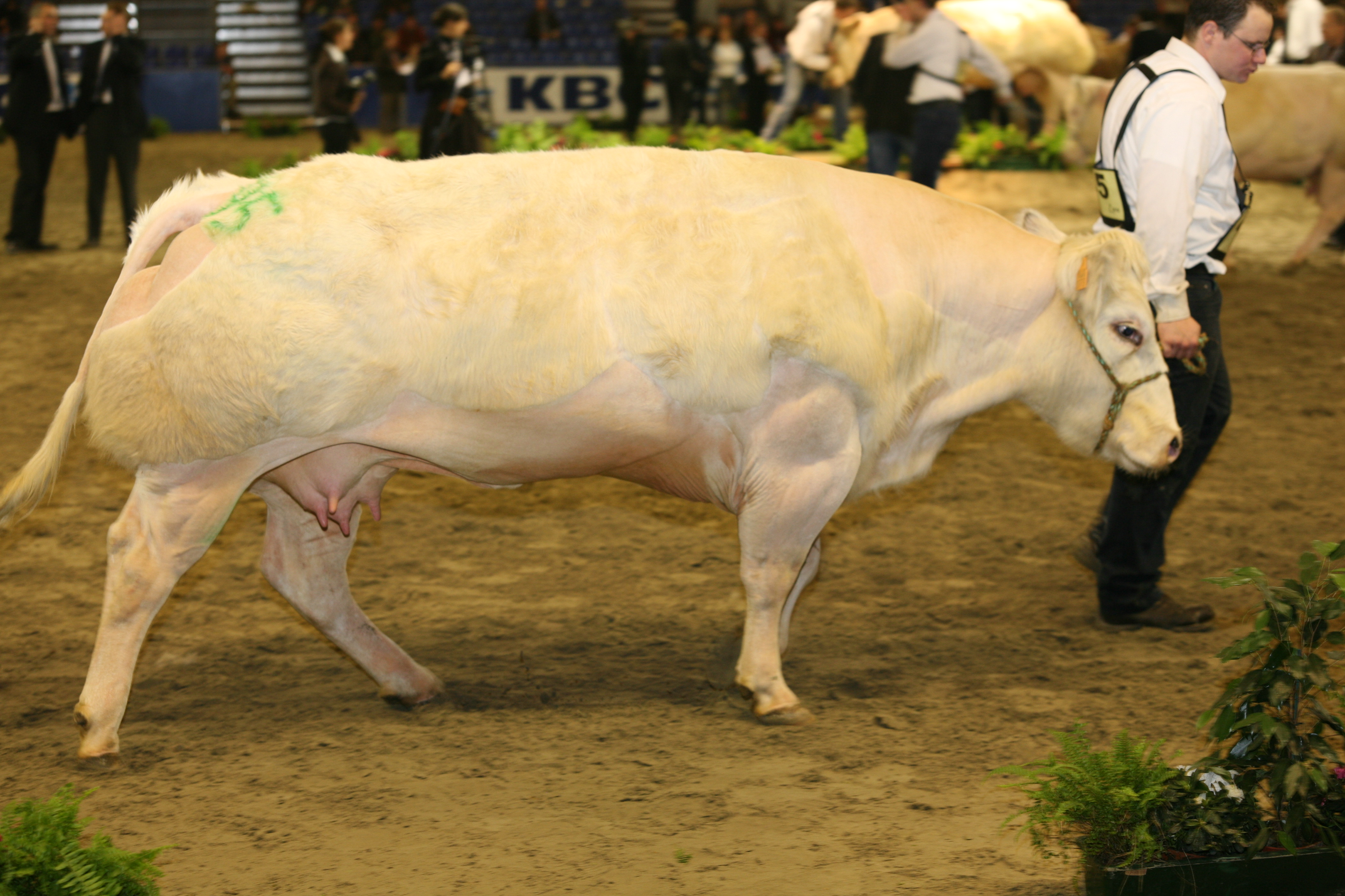 Agriflanders 2007 - vleesvee